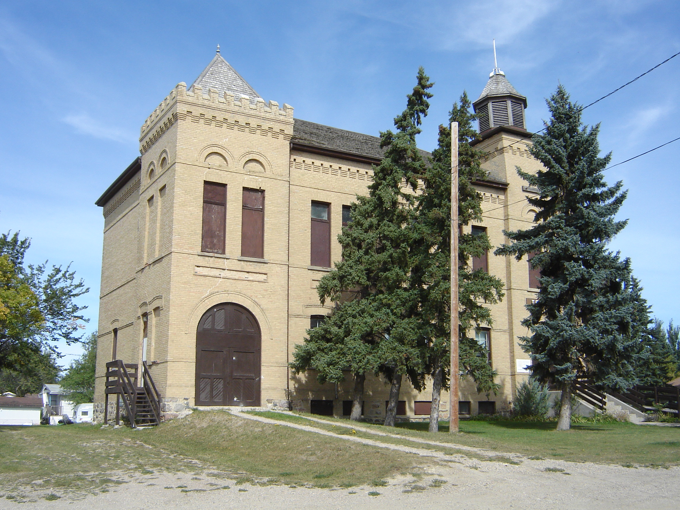 Qu'Appelle Saskatchewan